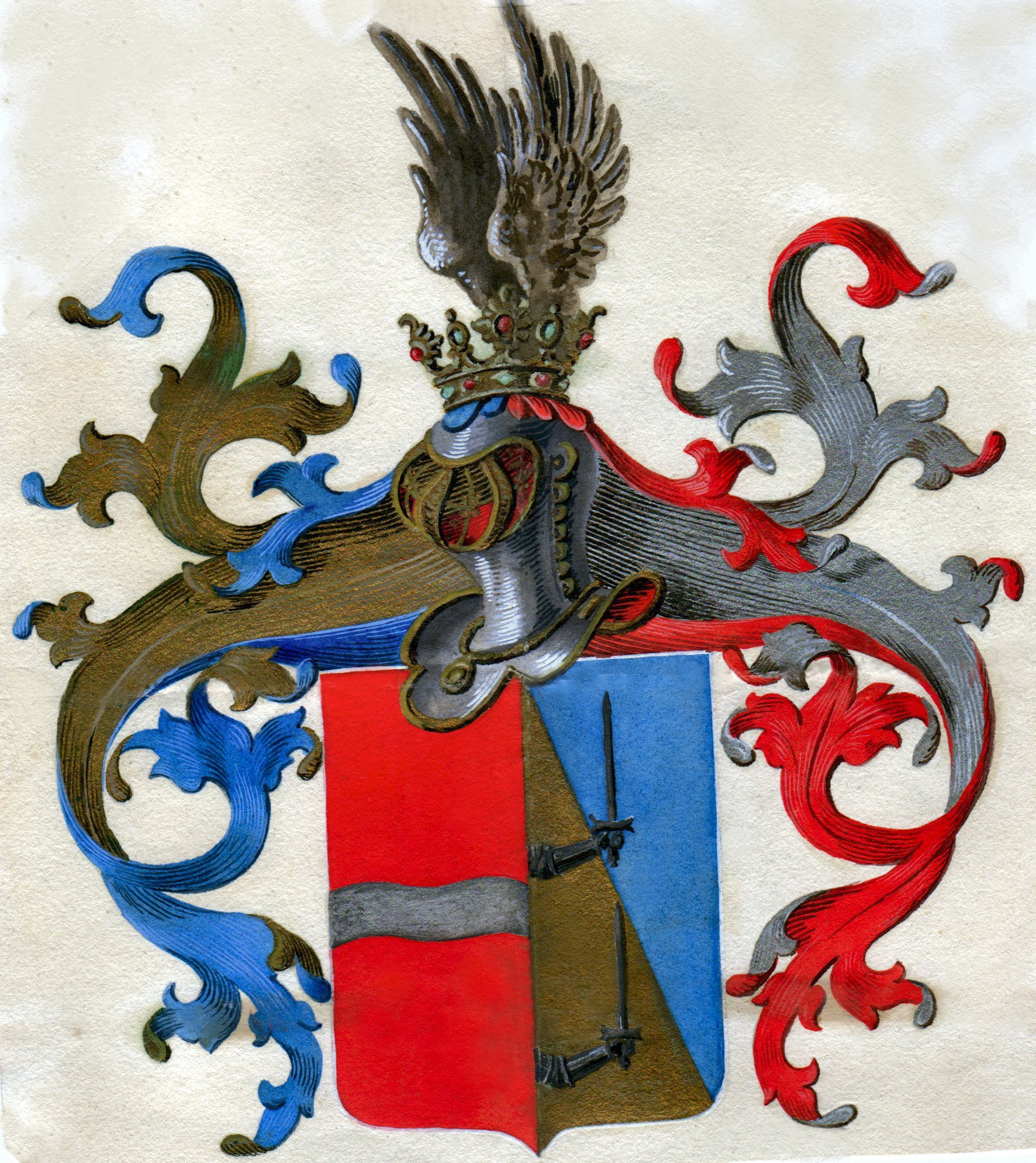 Wappen der Familie Mayerhoffer von Vedropolje vom 10. Dezember 1898